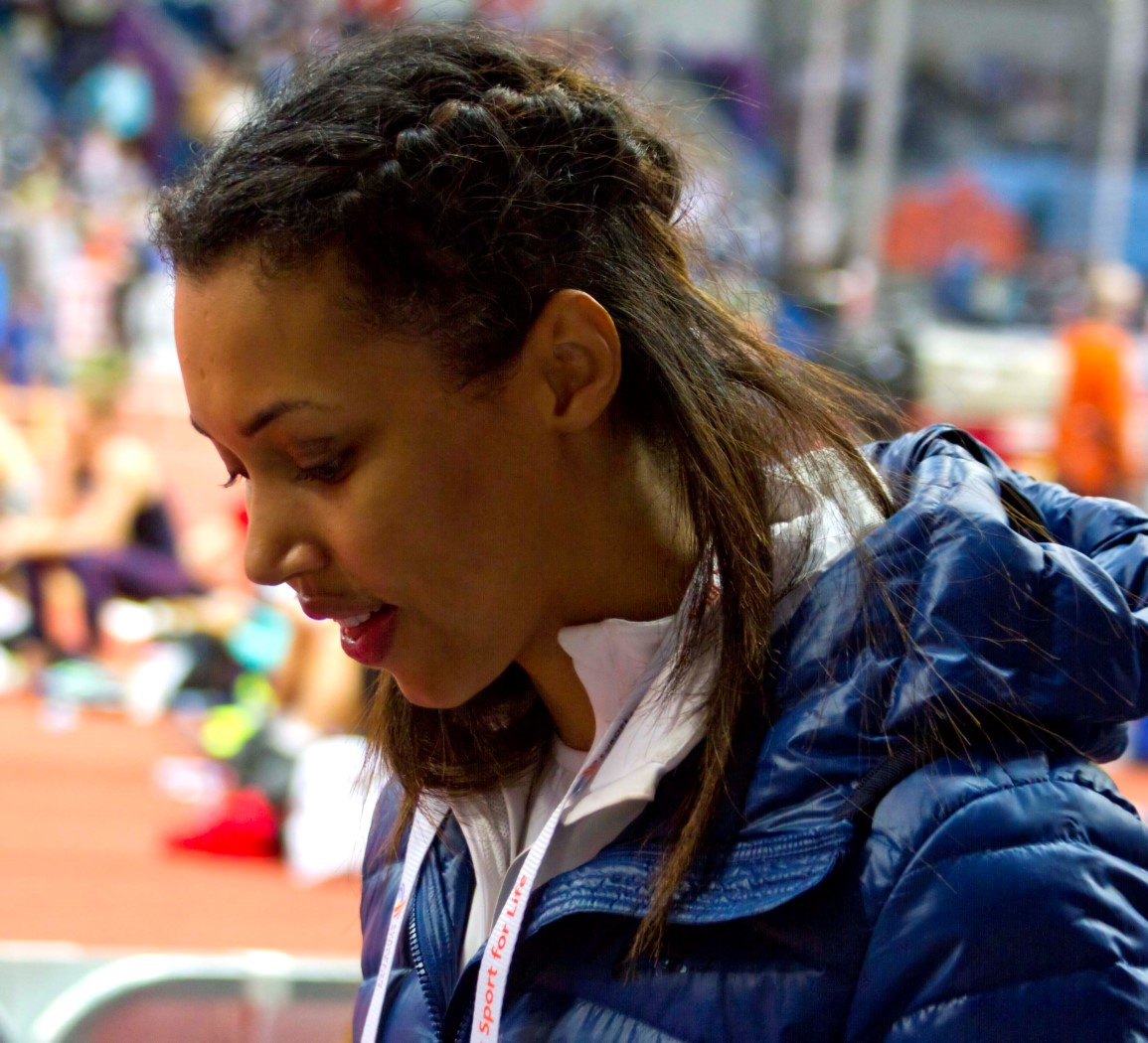 145 morgan lake